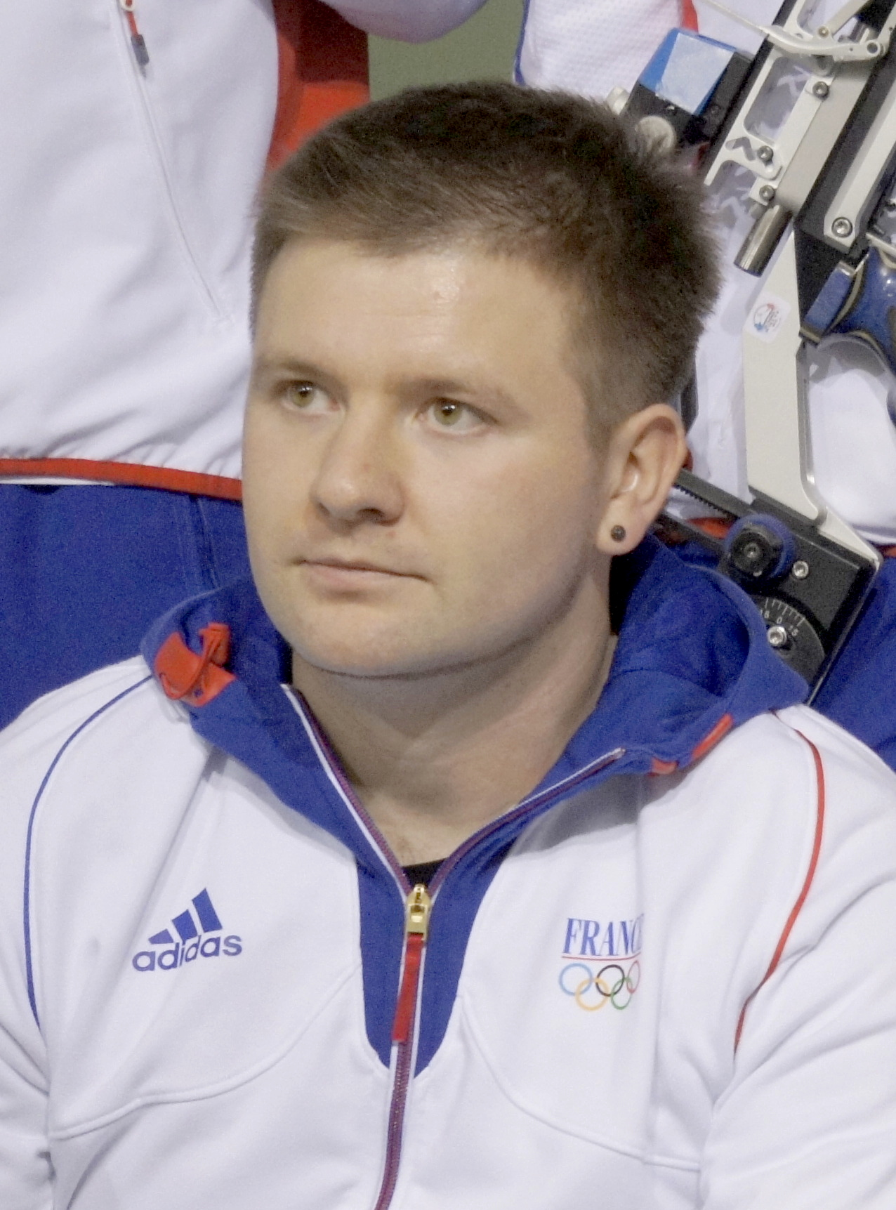 Championnat de France 2013 à Reims .